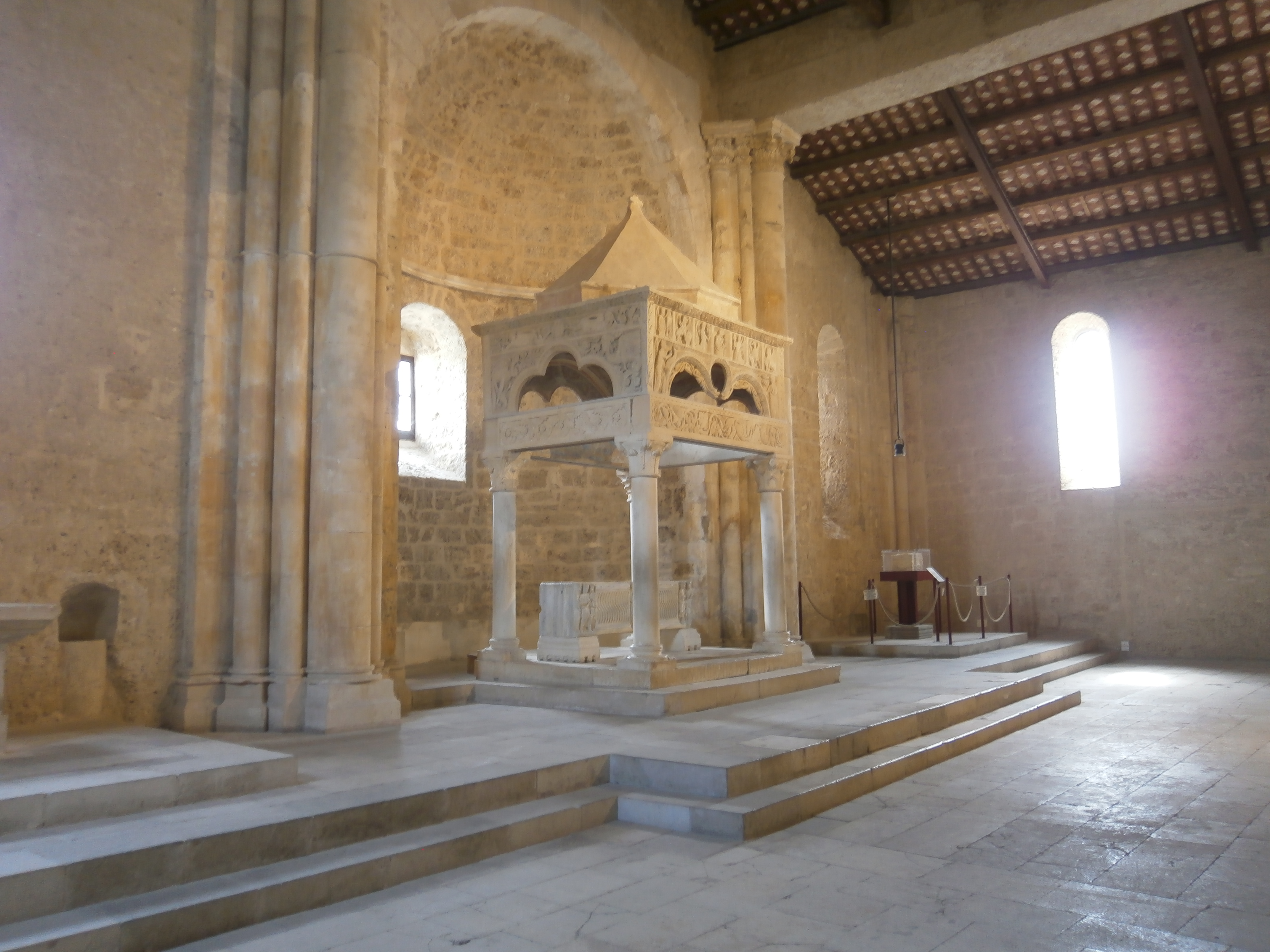 Abbazia di San Clemente a Casauria